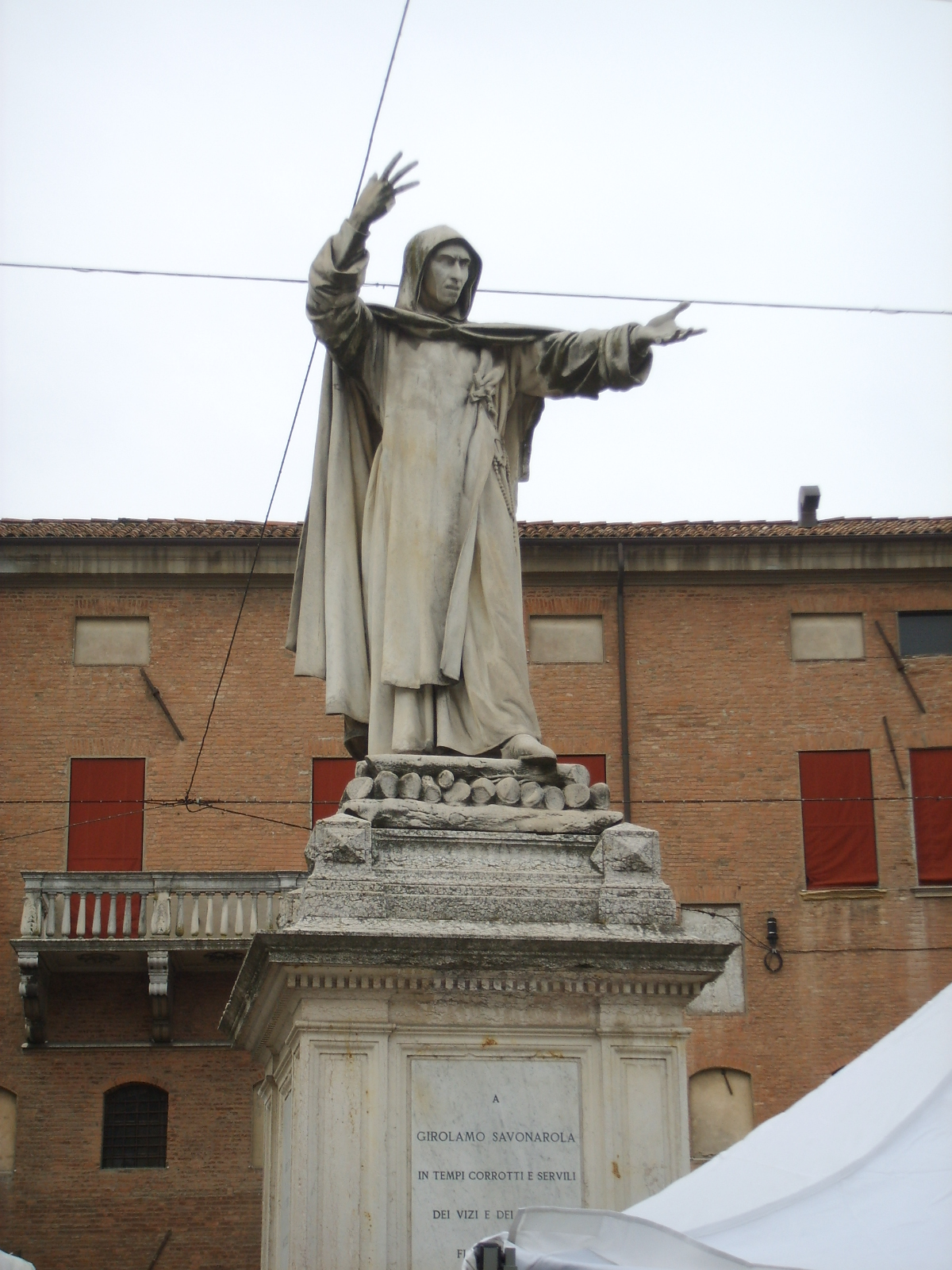 Ferrara, statua Girolamo Savonarola.